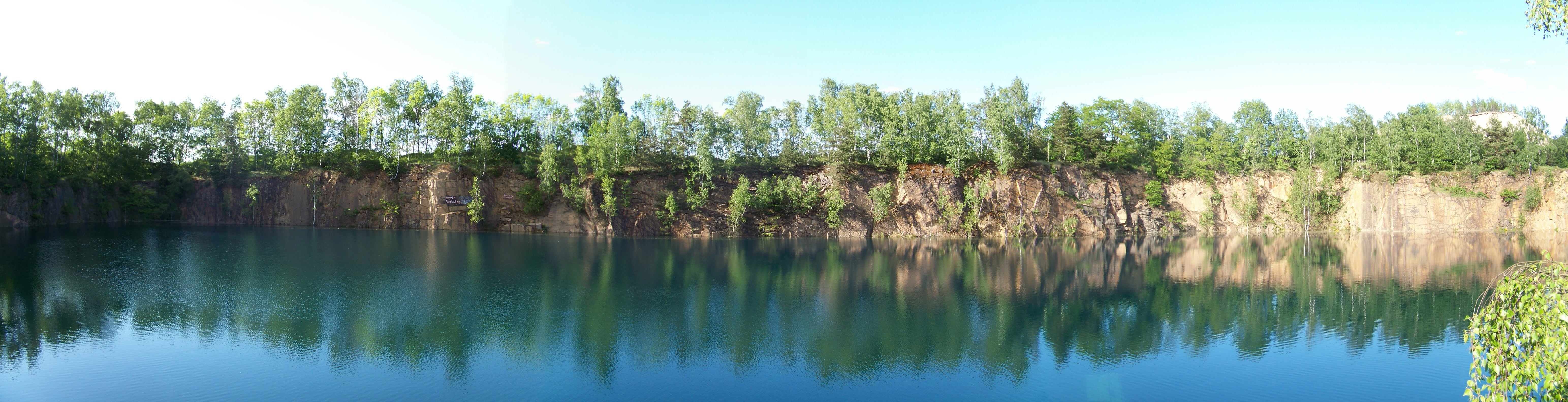 Ein durch Quarzporphyrabbau entstandener See in den Hohburger Bergen im Landkreis Leipzig (Sachsen) zwischen Kleinzschepa und Röcknitz; in der Nähe von Eilenburg und Wurzen